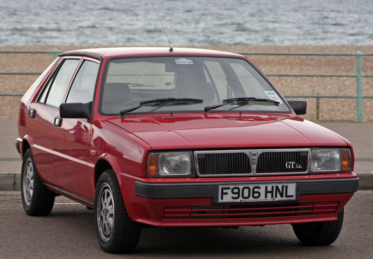 circa 1989 Lancia Delta GT i.e. at the Lancia London to Brighton Run September 2007_MG_3103